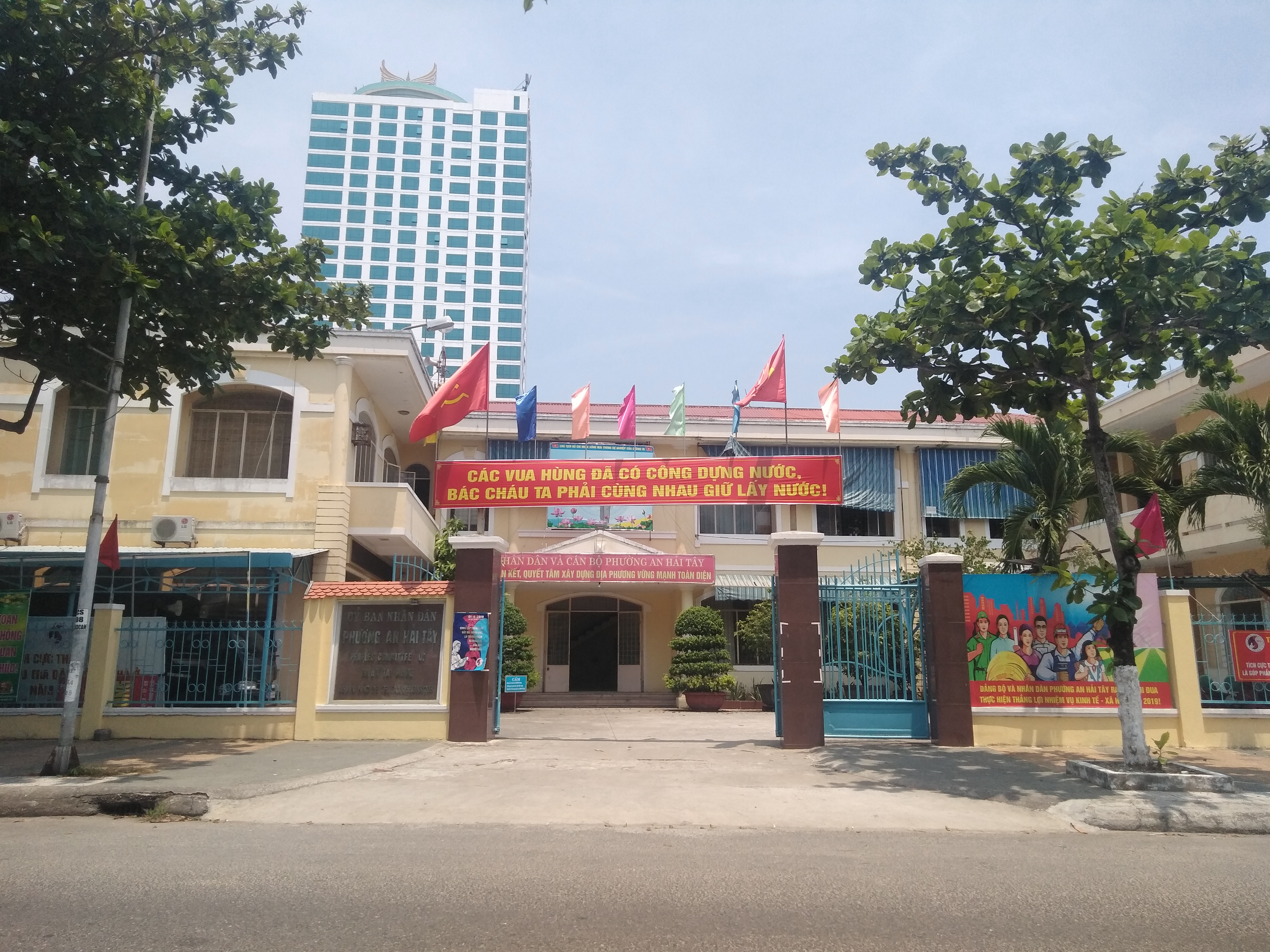 UBND phường An Hải Tây, Sơn Trà, Đà Nẵng